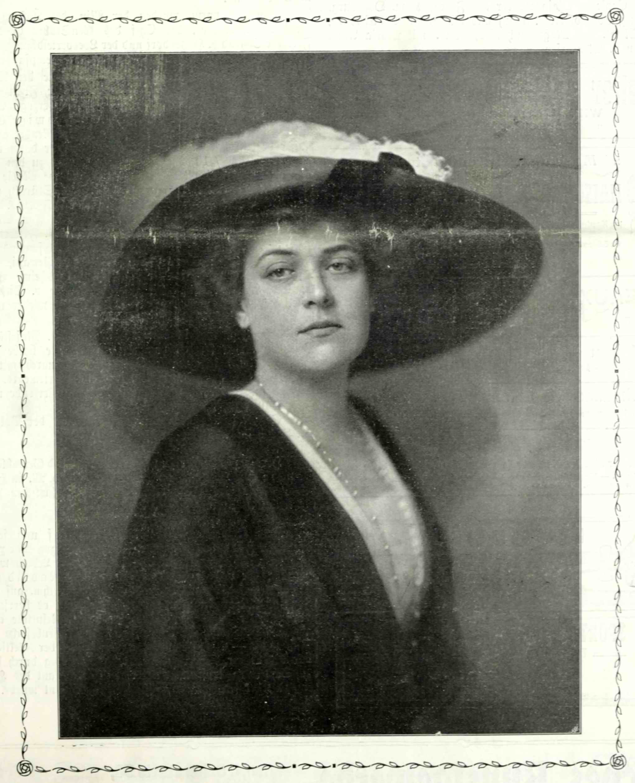 Hadik-Barkóczy Endréné Zichy Klára